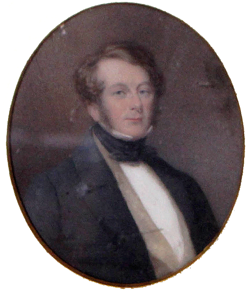 Edward Granville Eliot, 3r Conde de St. Germans (1798 - 1877). Lord Eliot